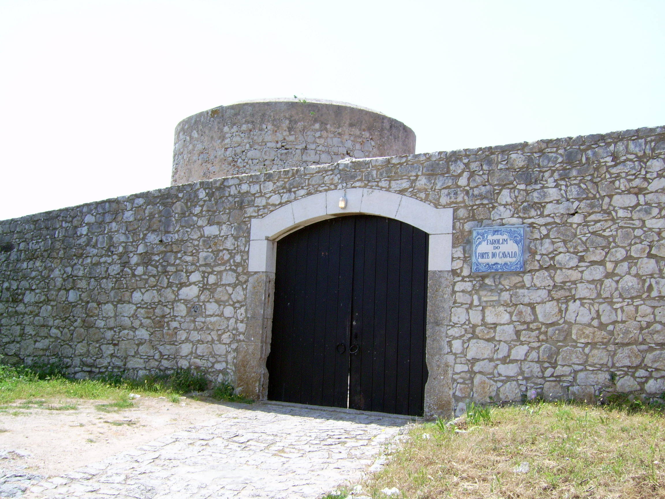 Forte_de_São_Teodósio_da_Ponta_do_Cavalo - entrada Local - Sesimbra / Portugal user:sacavem (pt) (usuário:sacavem)